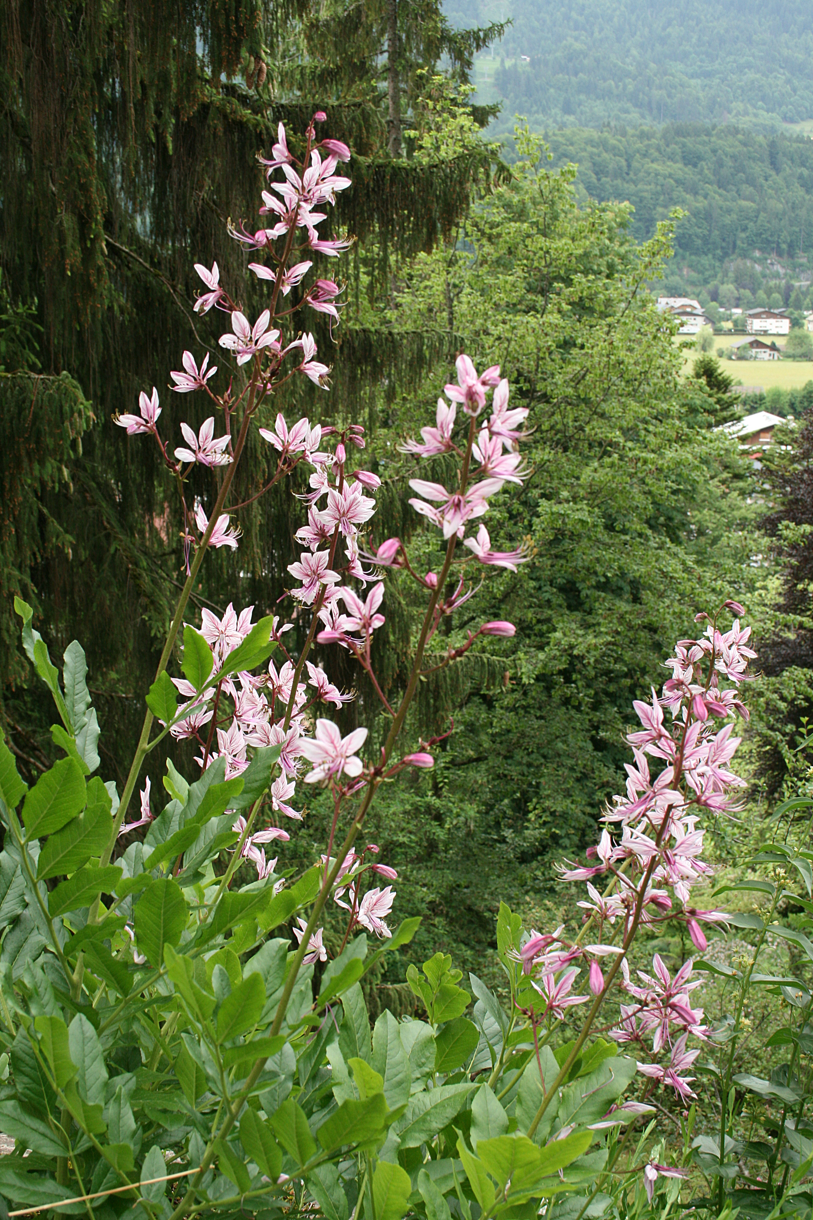 Dictamnus albus